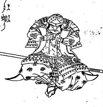 福原越後